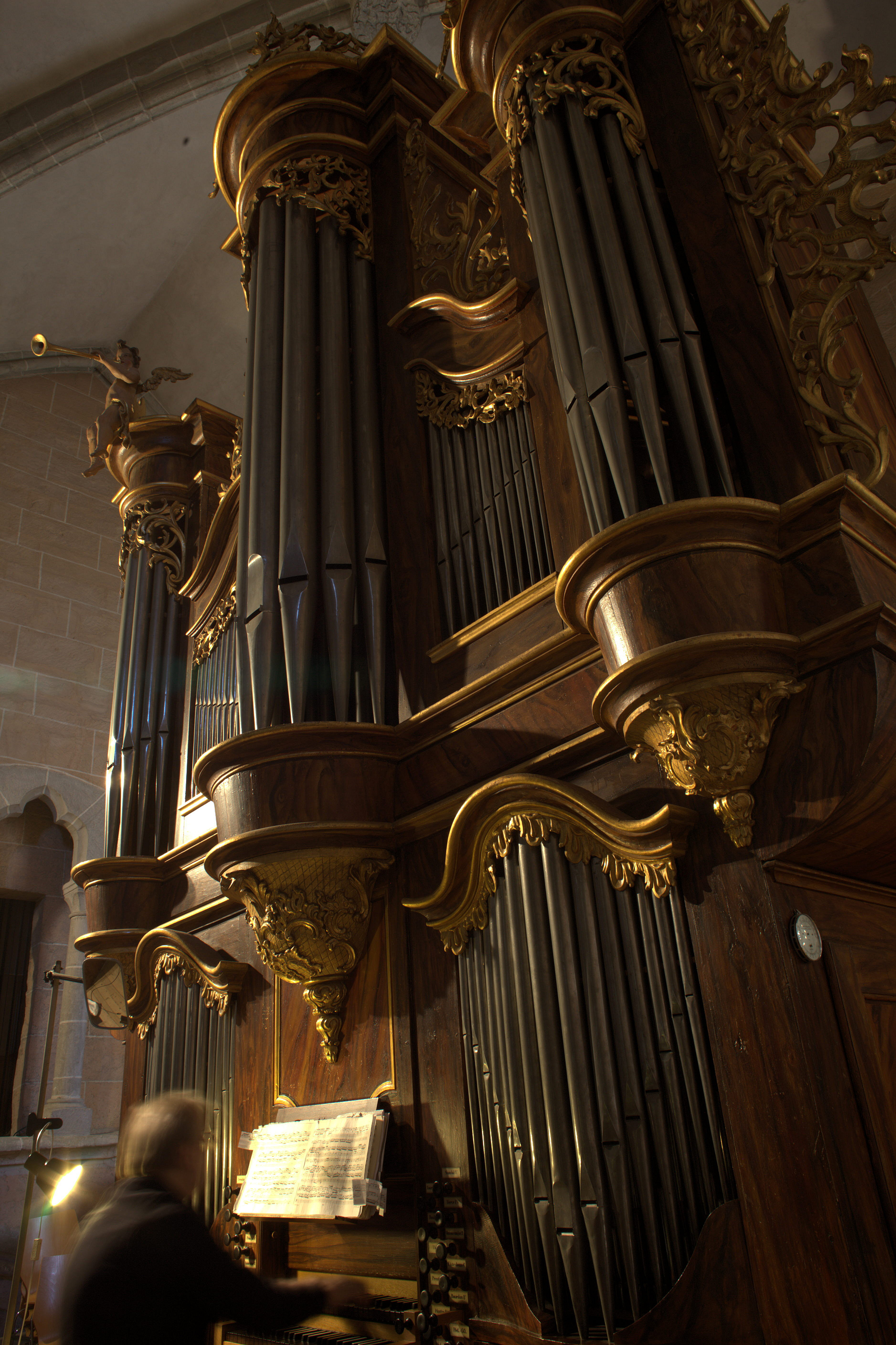 Église de Saint-Etienne, Moudon